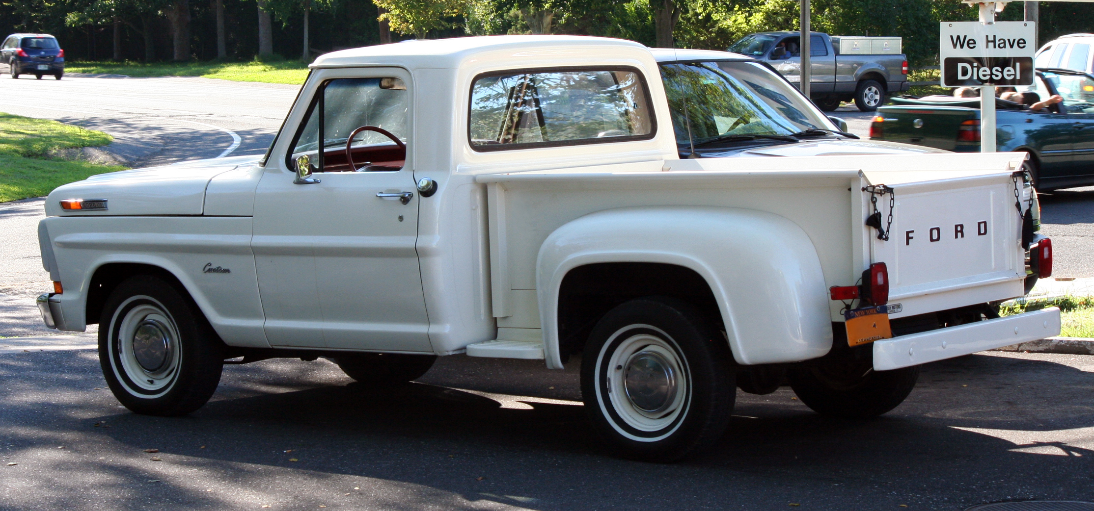 1971 Ford F-100 Flareside pickup seen in Amagansett, NY